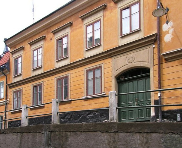 Brännkyrkagatan 18, Wahlbergska huset, Södermalm, Stockholm, Sweden.